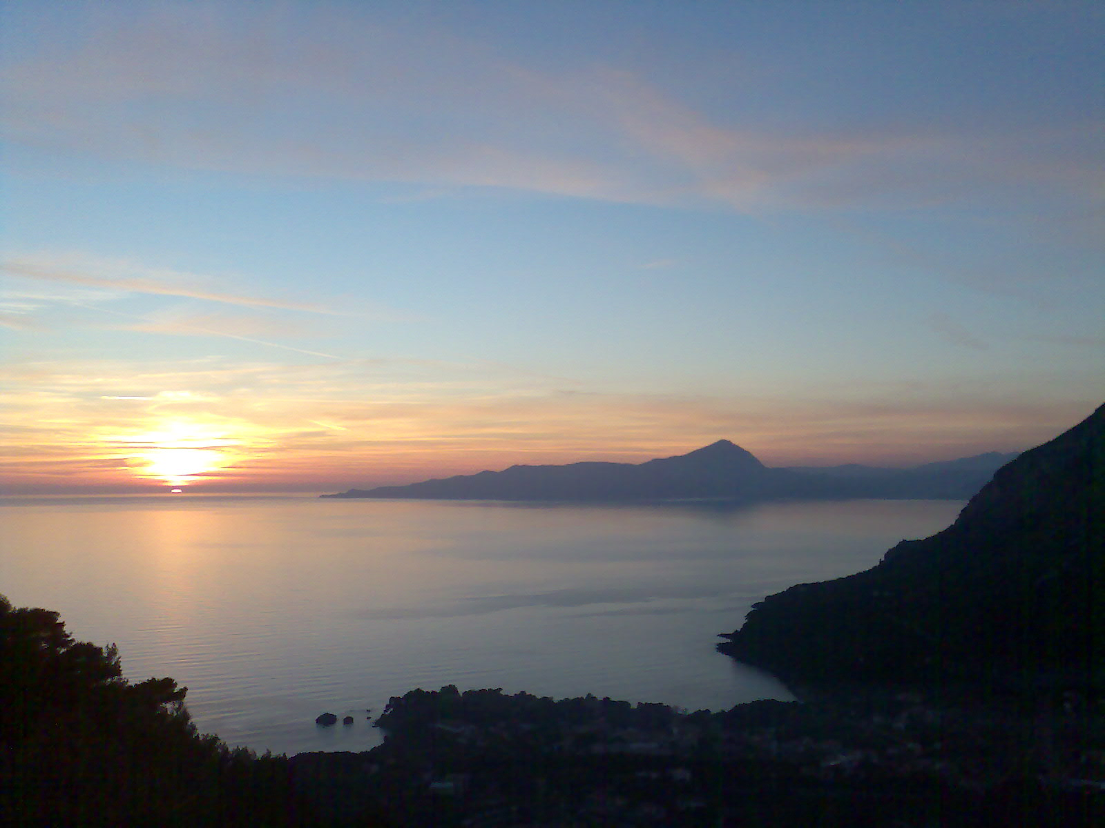 GF sapri